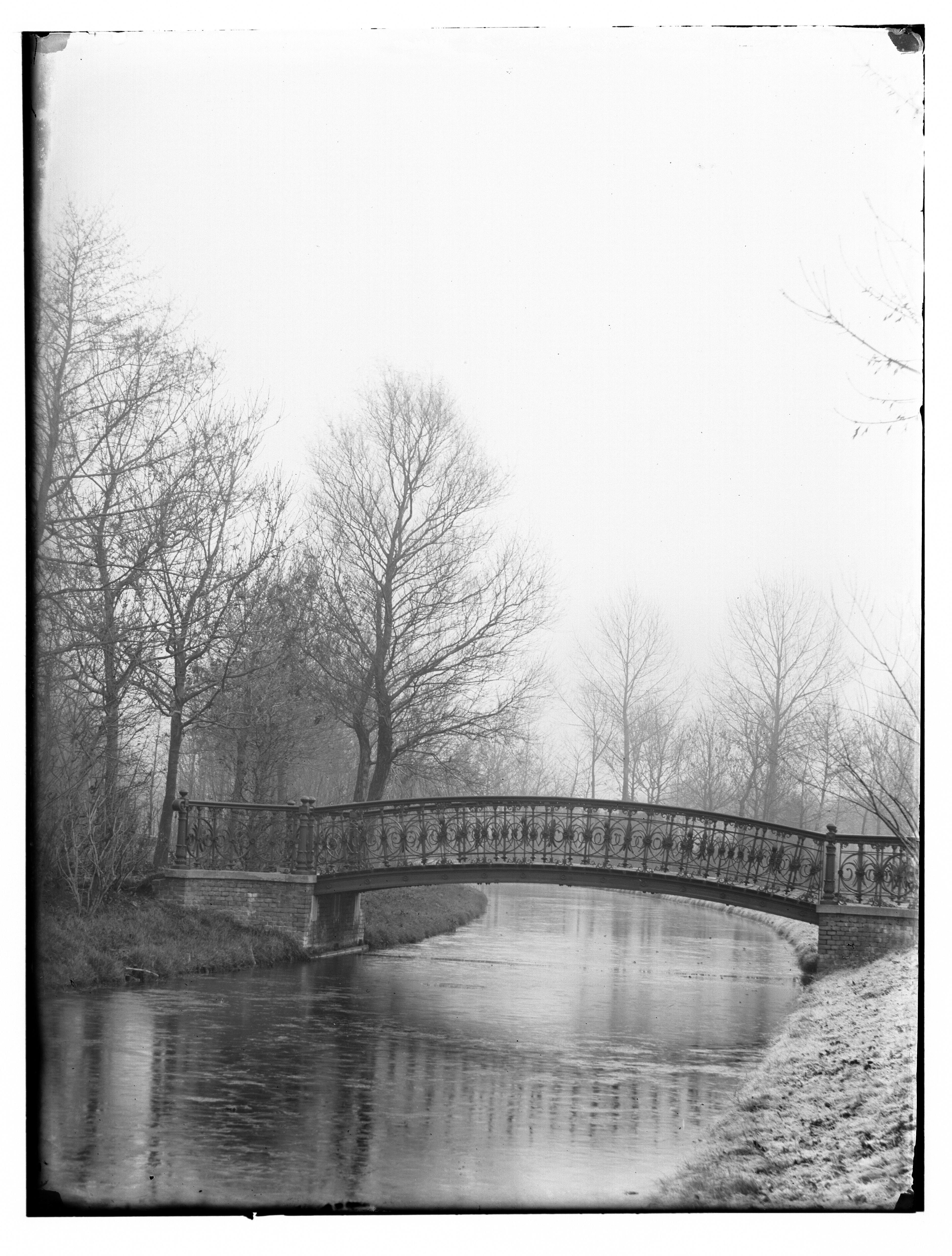 Beschrijving Vondelpark Sneeuwlandschap met brug 455. Documenttype foto Vervaardiger Olie``, Jacob (1834-1905) Collectie Collectie Jacob Olie Jbz. Datering 1893 Geografische naam Vondelpark Inventarissen Afbeeldingsbestand 010019000406 Generated with Dememorixer